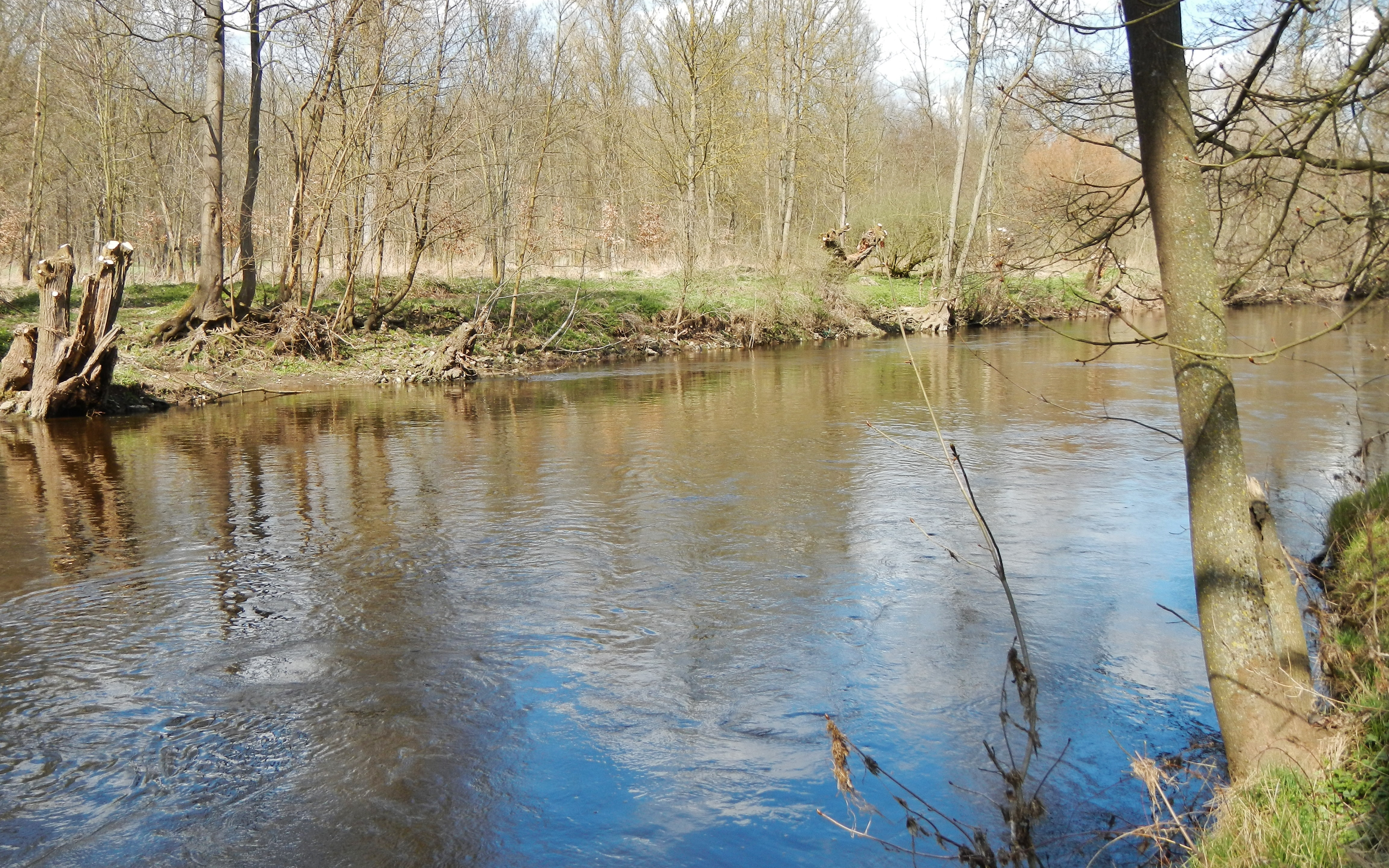 Enz bei Oberriexingen